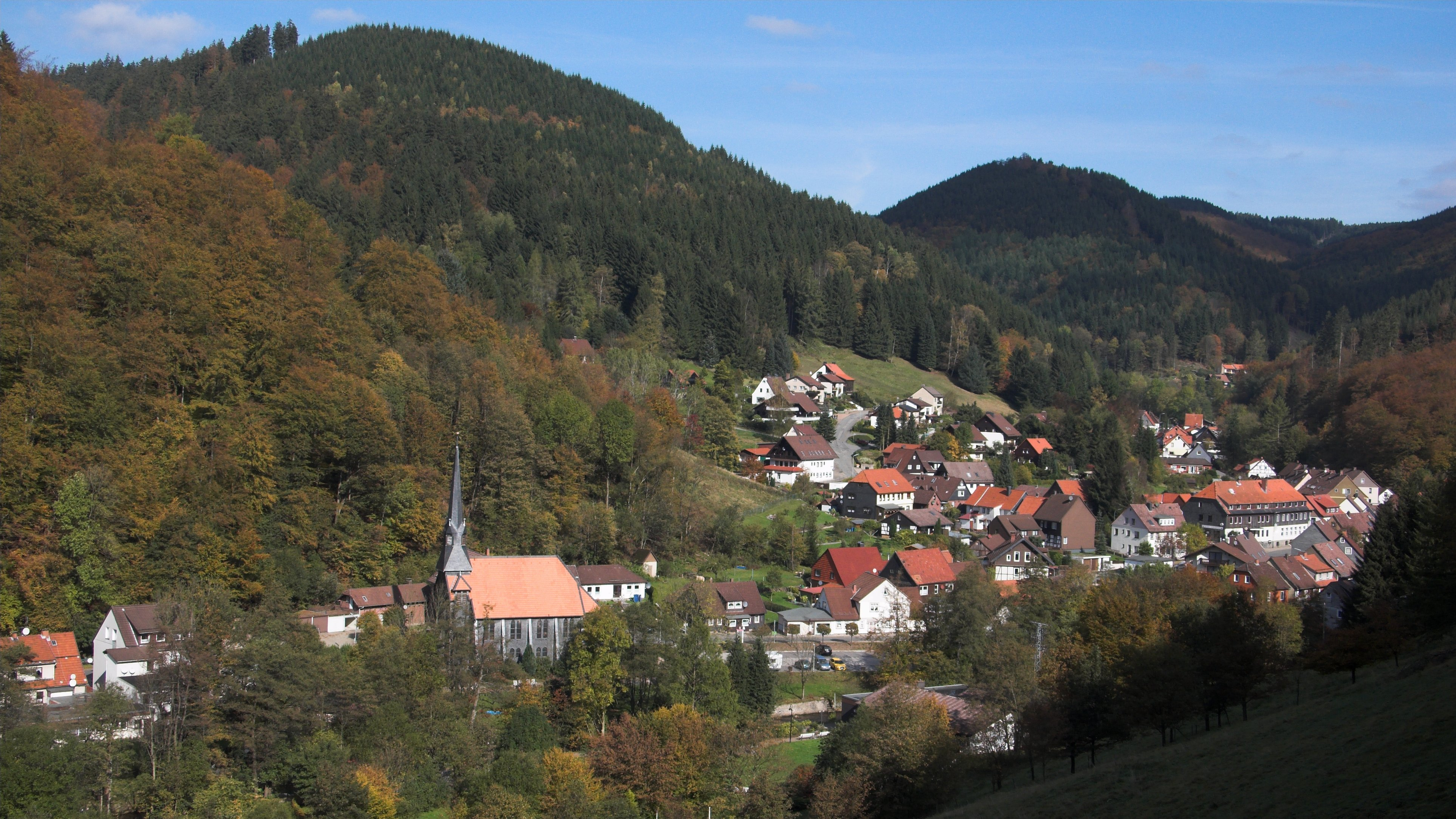 Der Ostteil von Sieber, aufgenommen vom Panoramaweg